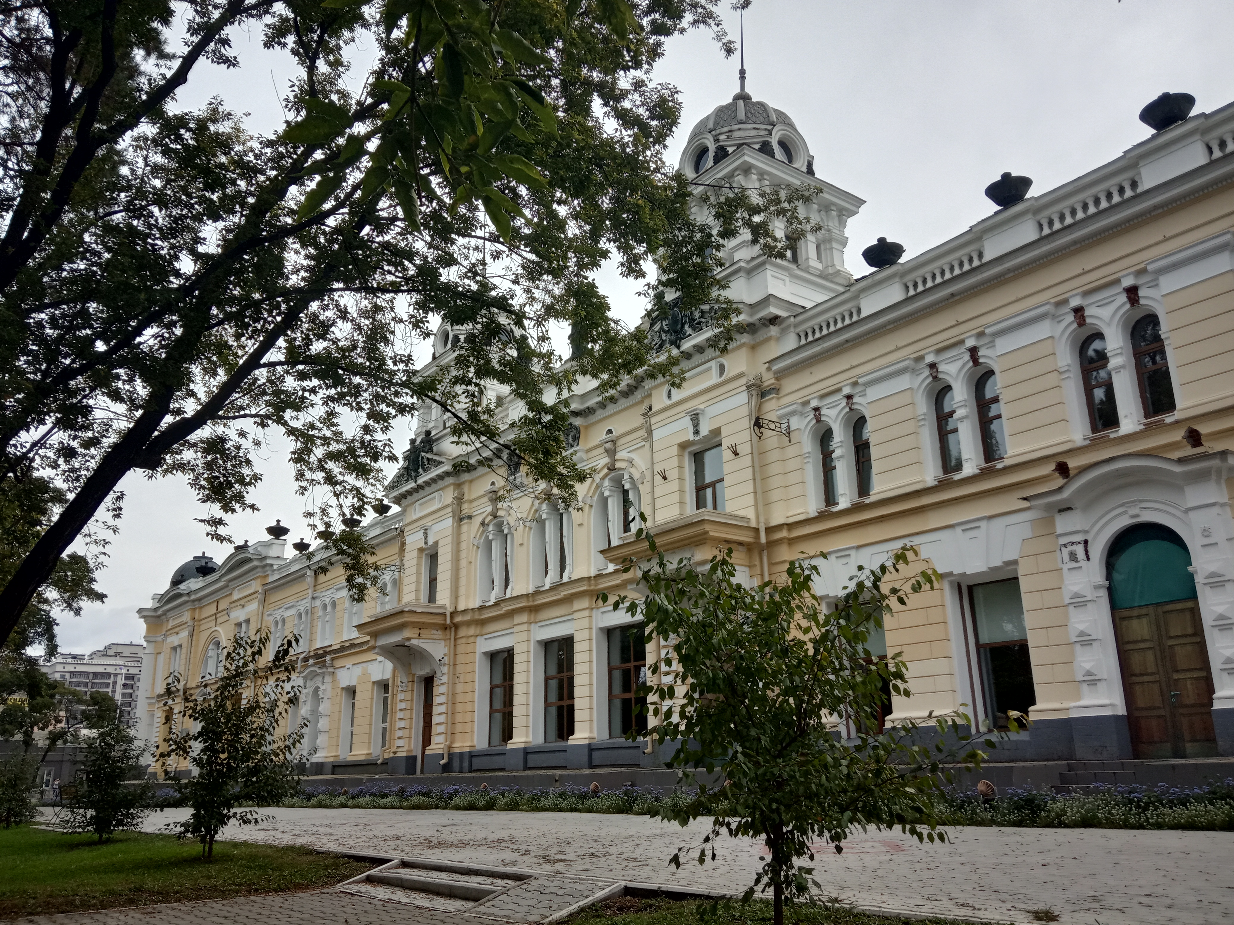 Дом пионеров после реставрации